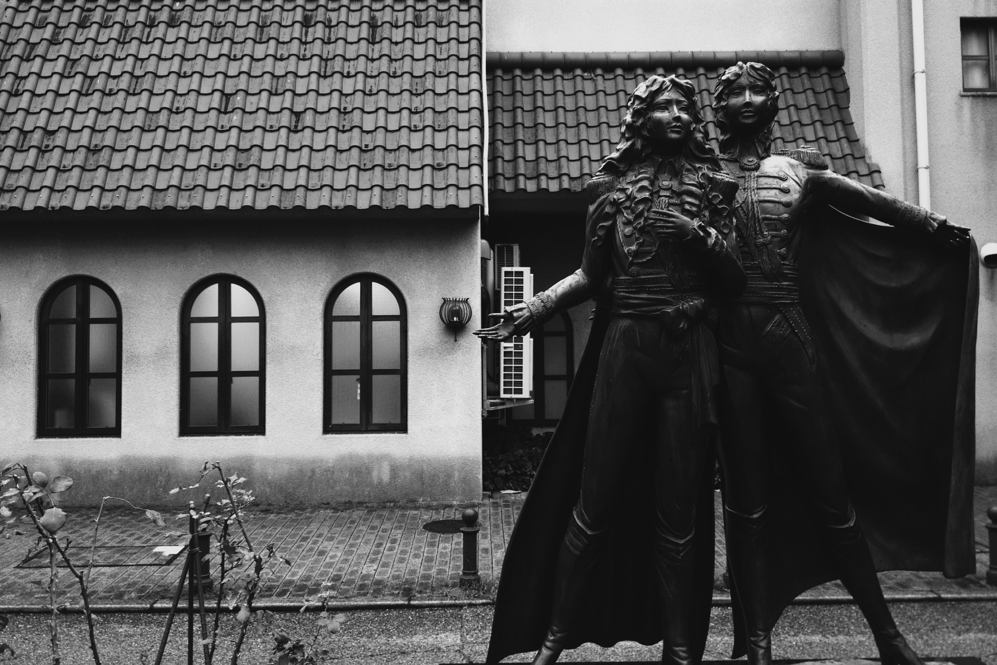 500px provided description: Takarazuka Roses [#rua ,#japao ,#moment of the space ,#takarazuka ,#takarazuka revue]